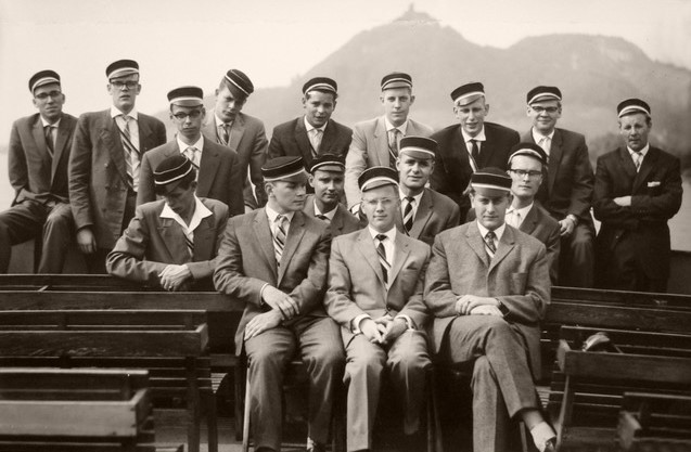 Angehörige des Corps Borussia Breslau zu Köln und Aachen auf dem Rhein